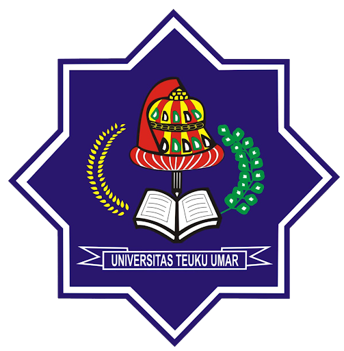 Ini adalah logo yang dimiliki oleh Universitas Teuku Umar dan digunakan untuk Universitas Teuku Umar